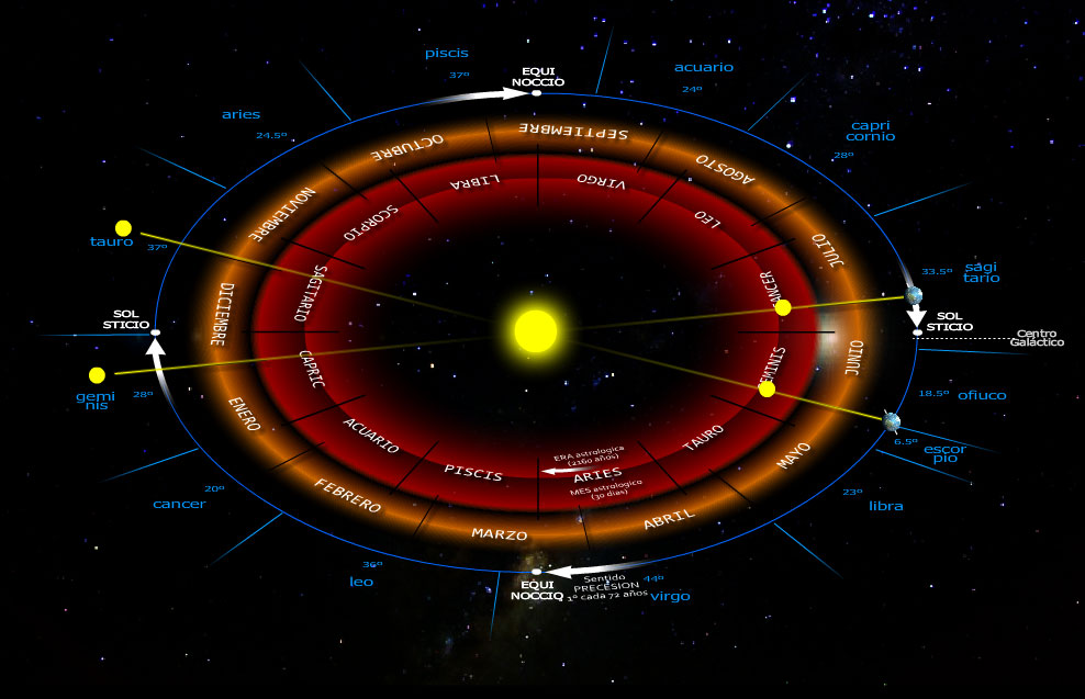 Representación de la órbita de la Tierra con la referencia externa del centro de la Galaxia y con los puntos básicos de los solsticios y equinoccios y el sentido de su precesión. Se representan también las longitudes de arco de las constelaciones eclípticas y se añaden los meses del calendario romano gregoriano (franja anaranjada) y los meses o signos del calendario astrológico (zodiaco, horóscopo, la franja rojiza). El planeta Tierra aparece posicionado en el punto correspondiente a la fecha del calendario gregoriano 13 de junio, correspondiente al día 23 del mes/signo astrológico de Géminis mientras desde la Tierra se ve al Sol hacia el final de la constelación de Tauro.